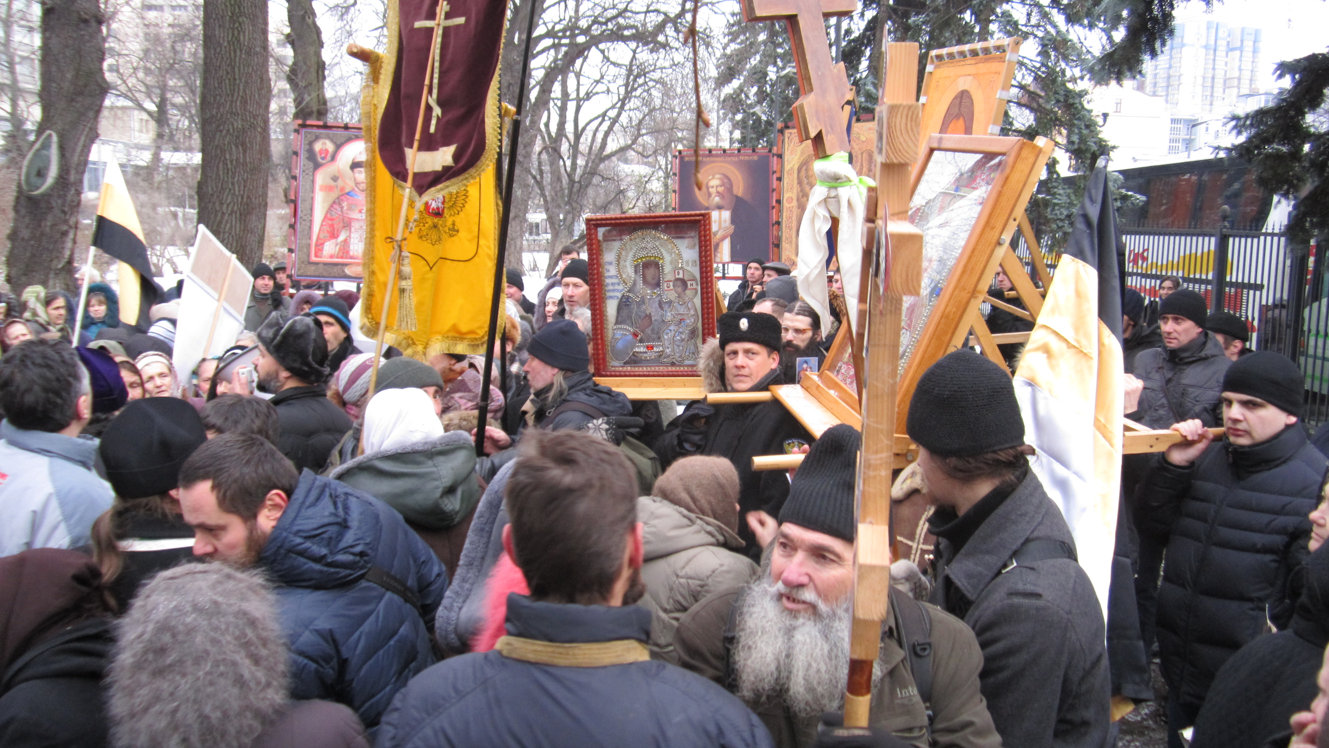 Учасники так званого «хресного ходу» проти європейської інтеграції України («євросодомії») влаштованого Братством Олександра Невського, «Православним вибором» і «Народним Собором». Маріїнський парк, Київ.